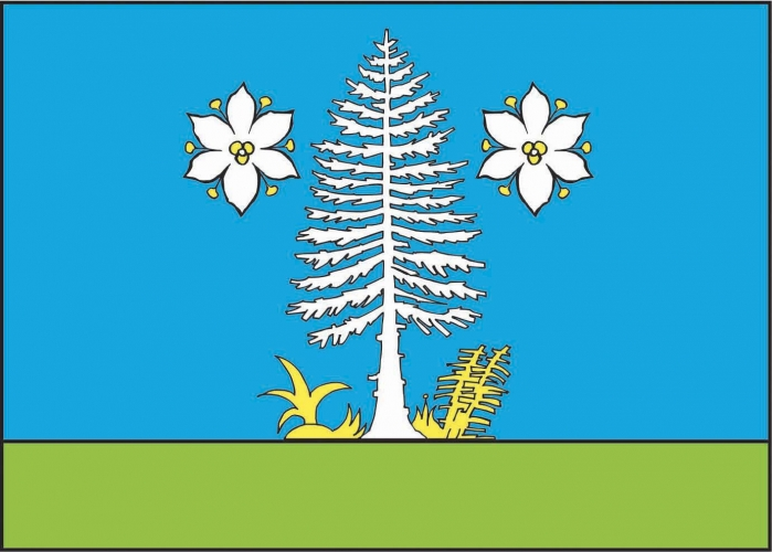 vlajka, Cikháj, okres Žďár nad Sázavou